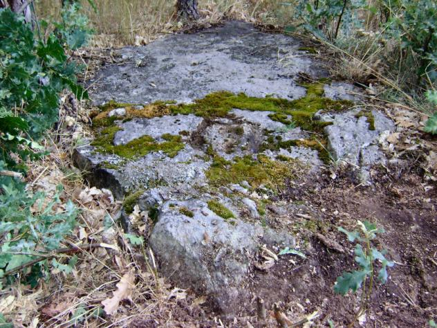 Huella supuestamento dejada por la pezuña del caballo del Apóstol Santiago en el término de Garueña.